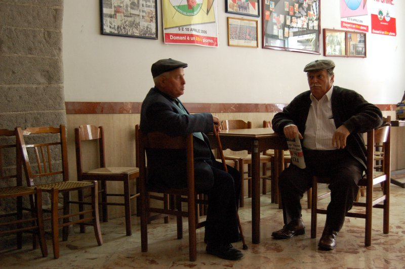 Piana degli Albanesi (PA), ITA